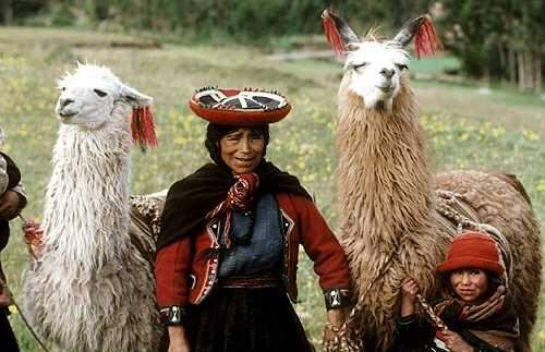 Kečua žena u pratnji svojih ljama (u departmanu Cusco, Peru). Qhichwa-Frau mit Lamas (Departement Qusqu, Peru). Qhichwa warmi llama michiq (Qusqu suyupi, Piruw mama llaqtapi). Suradnik:Zeljko-pa rurasqan